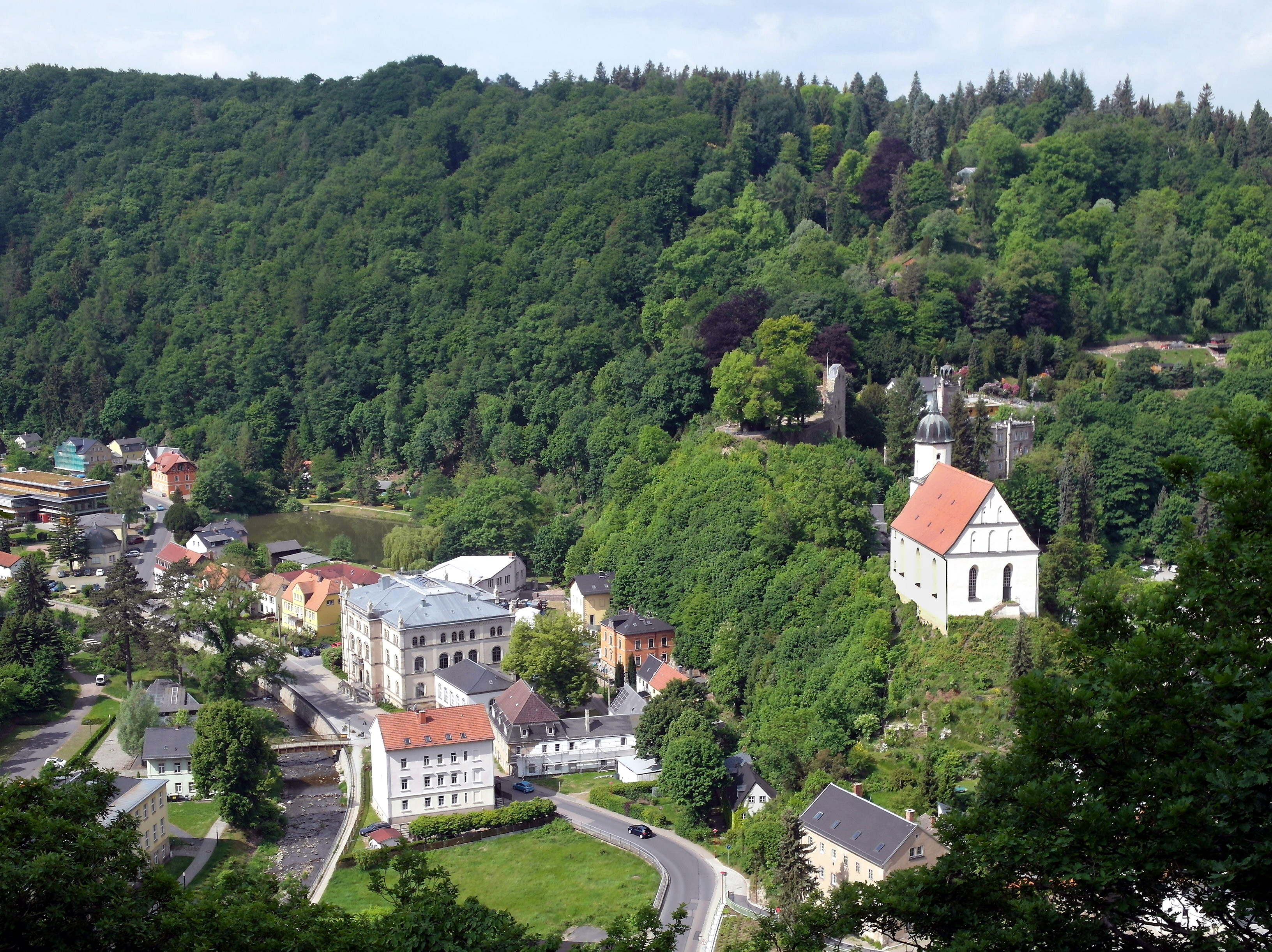 29.05.2015 01737 Tharandt: Blick vom Aussichtspunkt Johannishöhe (GMP: 50.984105,13.586463) auf Tharandt: Bergkirche Zum Heiligen Kreuz / Burgruine (GMP: 50.982664,13.581209) / Villa Suminski (Gotisches Haus) / Haus Pienner Str. 6 / Forstliche Hochschule Tharandt, Pienner Str. 8 (GMP: 50.982391,13.582695) / Alte Forstvermessungsanstalt Pienner Str. 10 / Rossmässler-Bau, Pienner Str. 15 [SAM0531&.JPG]20150529205MDR.JPG(c)Blobelt